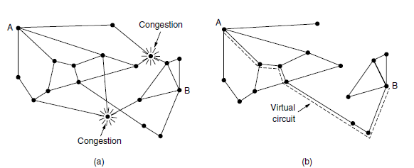 Şəkil 4. (a) Yüklənmiş bir şəbəkə. (b) Şəbəkənin yüklənməmiş hissəsi. A-dan B-ə virtual dövrdə göstərilir.